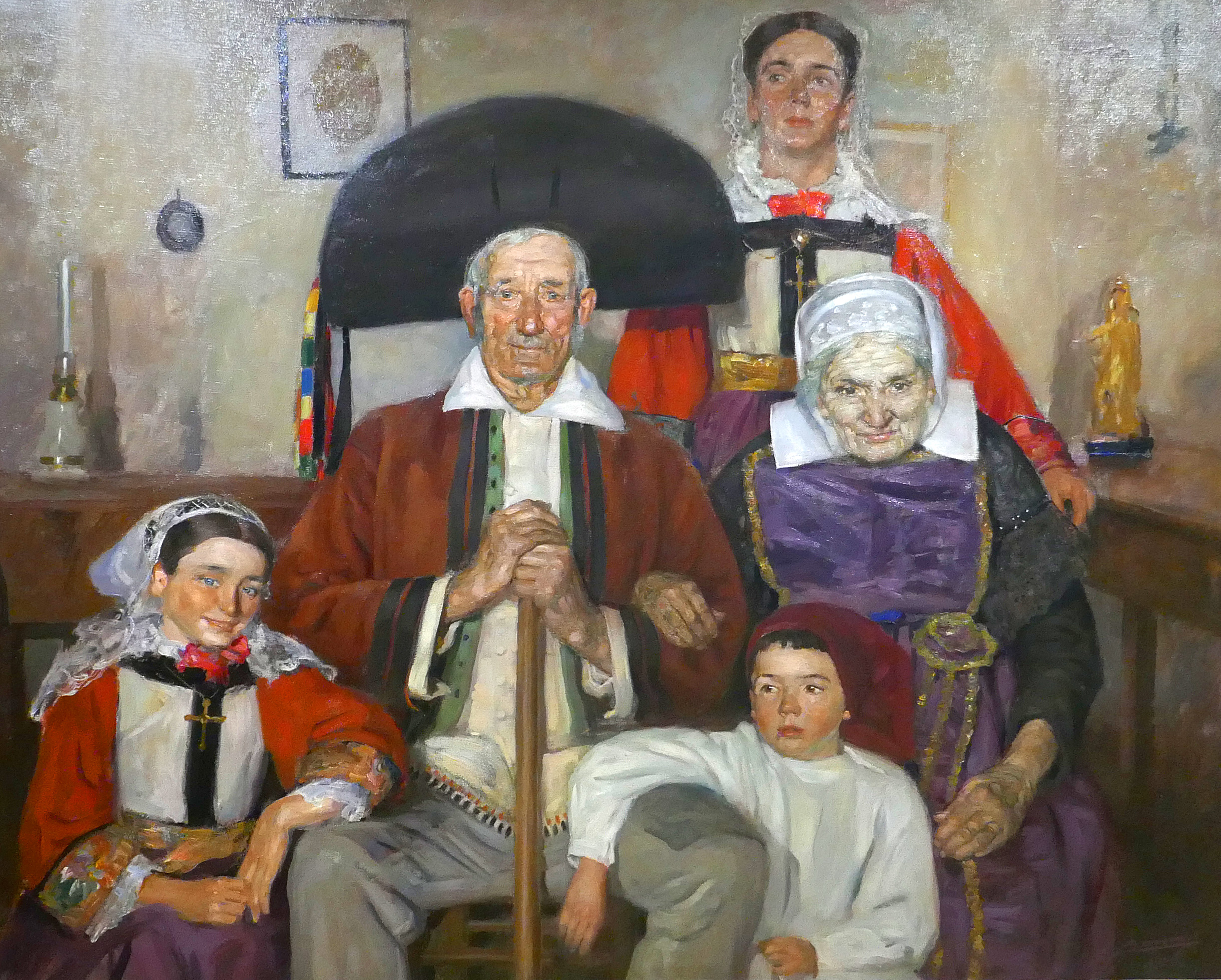 Lucien Jonas, Les Noces d'Or 1925. Huile sur toile brossée en quatre jours et demi, exécutée dans une maison de la rue de la Clique, au bourg de Saillé, entre le 1er et le 8 seprtembre 1925. Au centre le père Pain Blanc et son épouse. Le jeune garçon et la jeune femme sont Clair et Marie Diot. La jeune fille assise à la droite du vieillard est Solange Guénégo. Cette grande toile a été exposée hors concours au Salon des Artistes français en 1926. Collection du Musée des Marais salants.